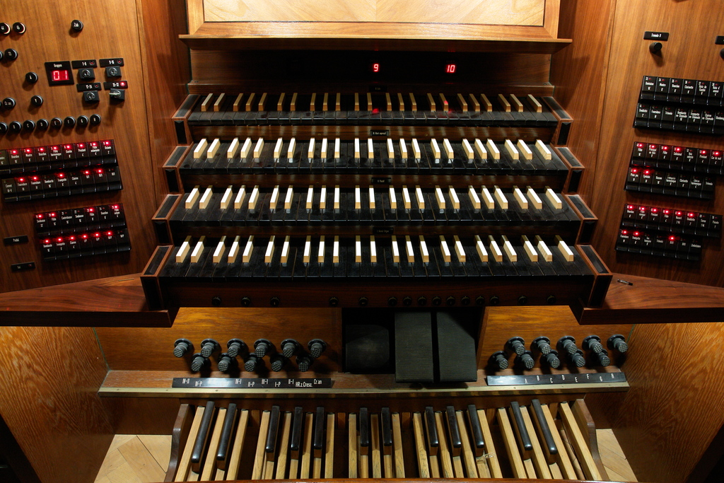 Az orgona mechanikus játszóasztala (Dohány utcai zsinagóga, Budapest)